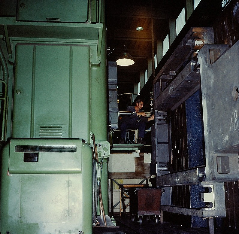 Original image description from the Deutsche FotothekZerspannungsfacharbeiter